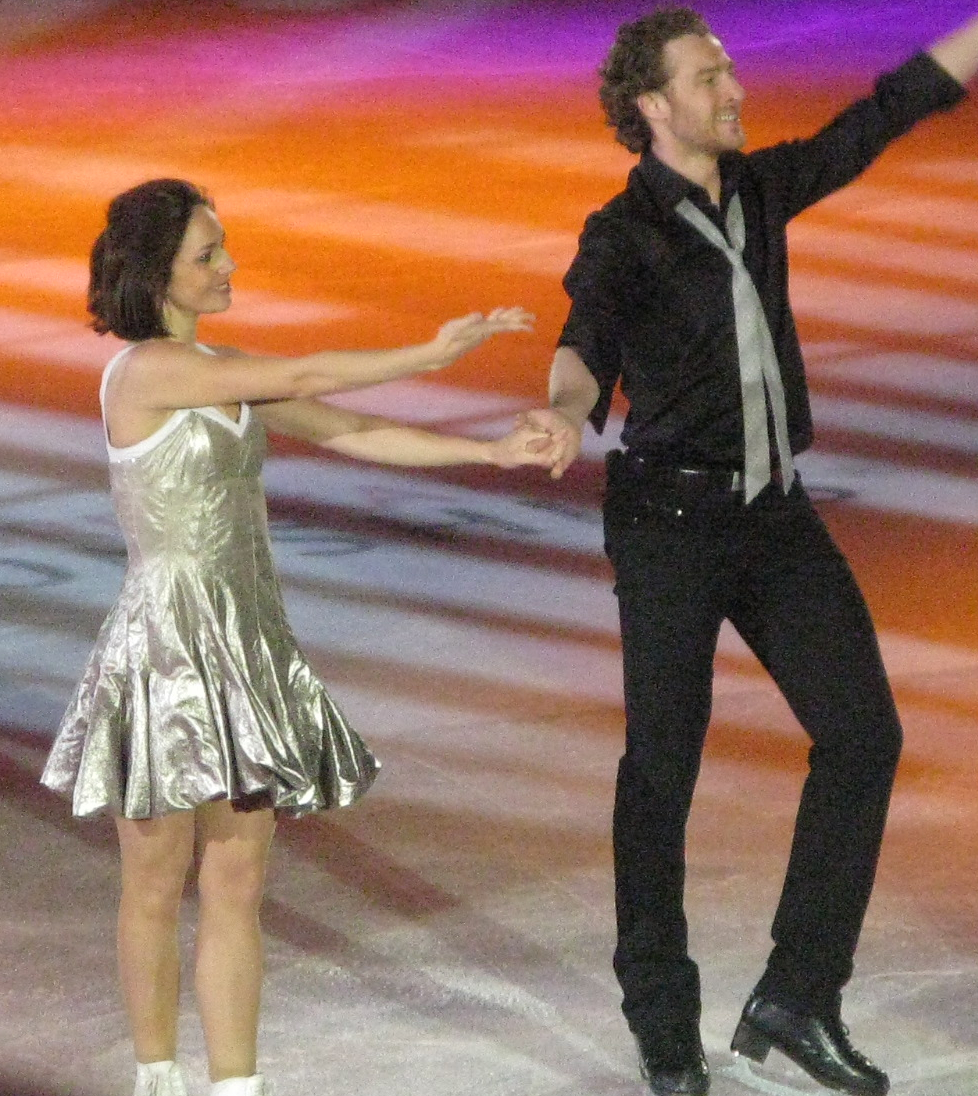 Nathalie Péchalat et Fabian Bourzat au gala des Championnats du monde de patinage artistique 2012 à Nice.